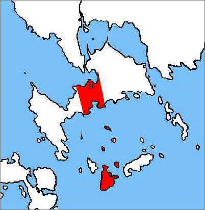 Karta Hinkaböle